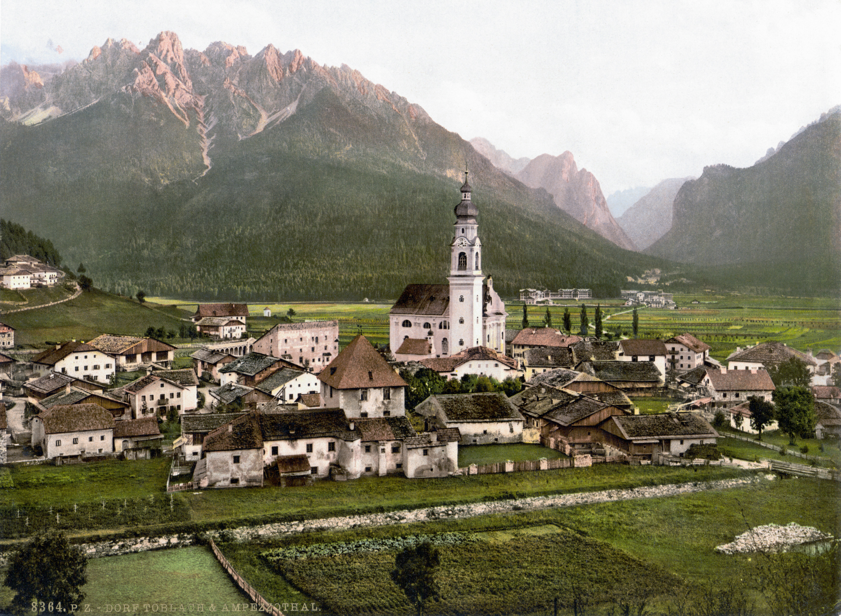 Toblach